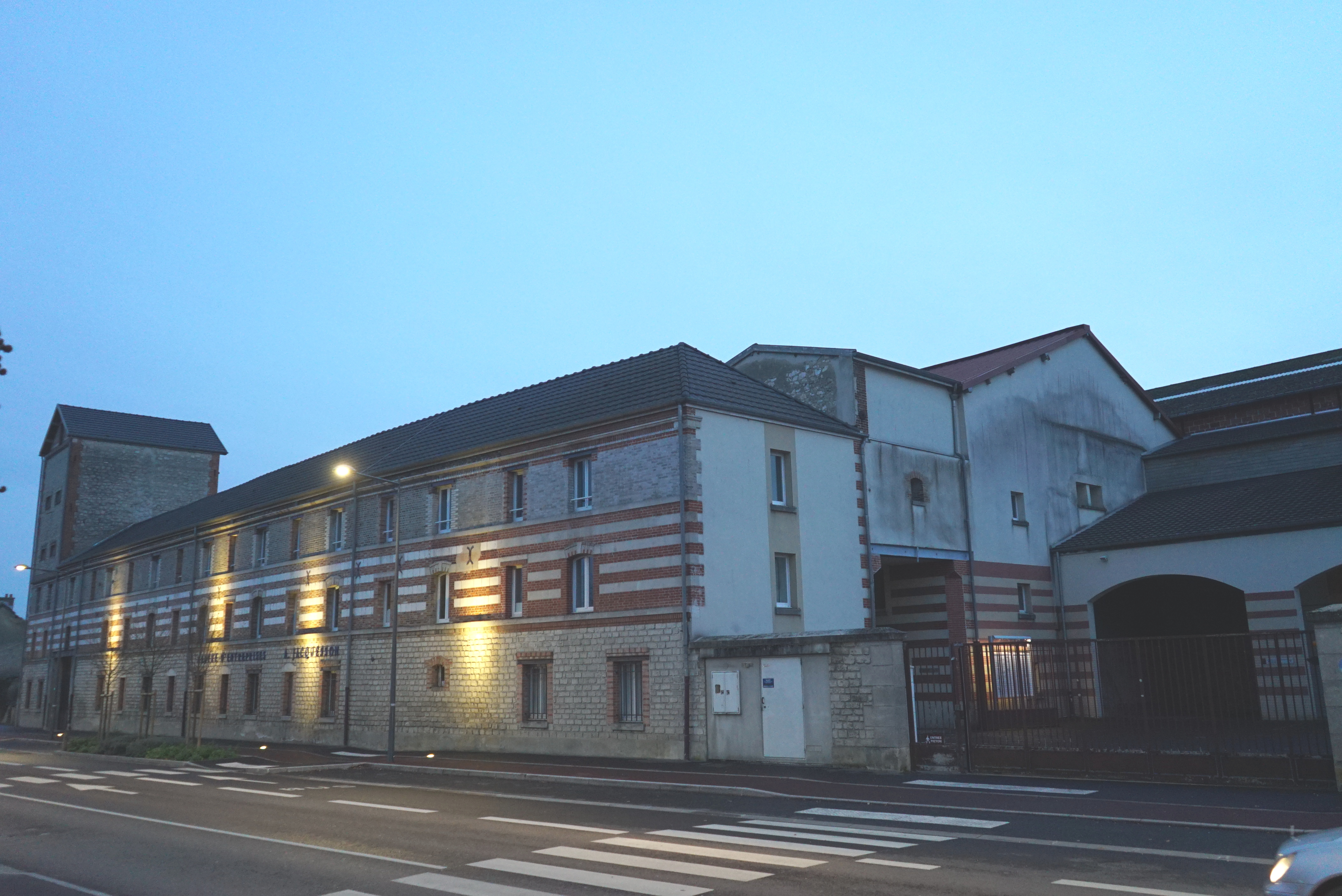 une vue des batiments de la maison de champagne Jacquesson.